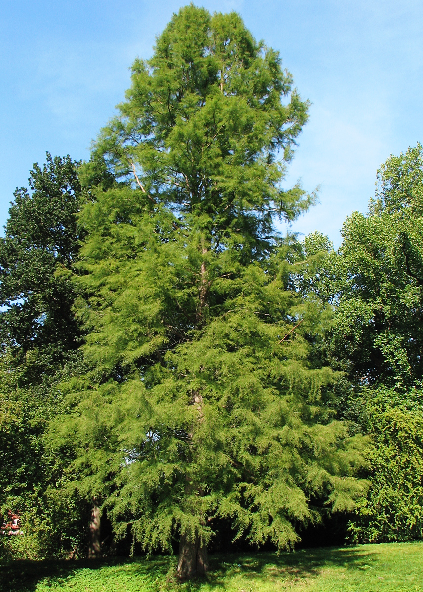 Sumpfzypresse (Taxodium distichum)